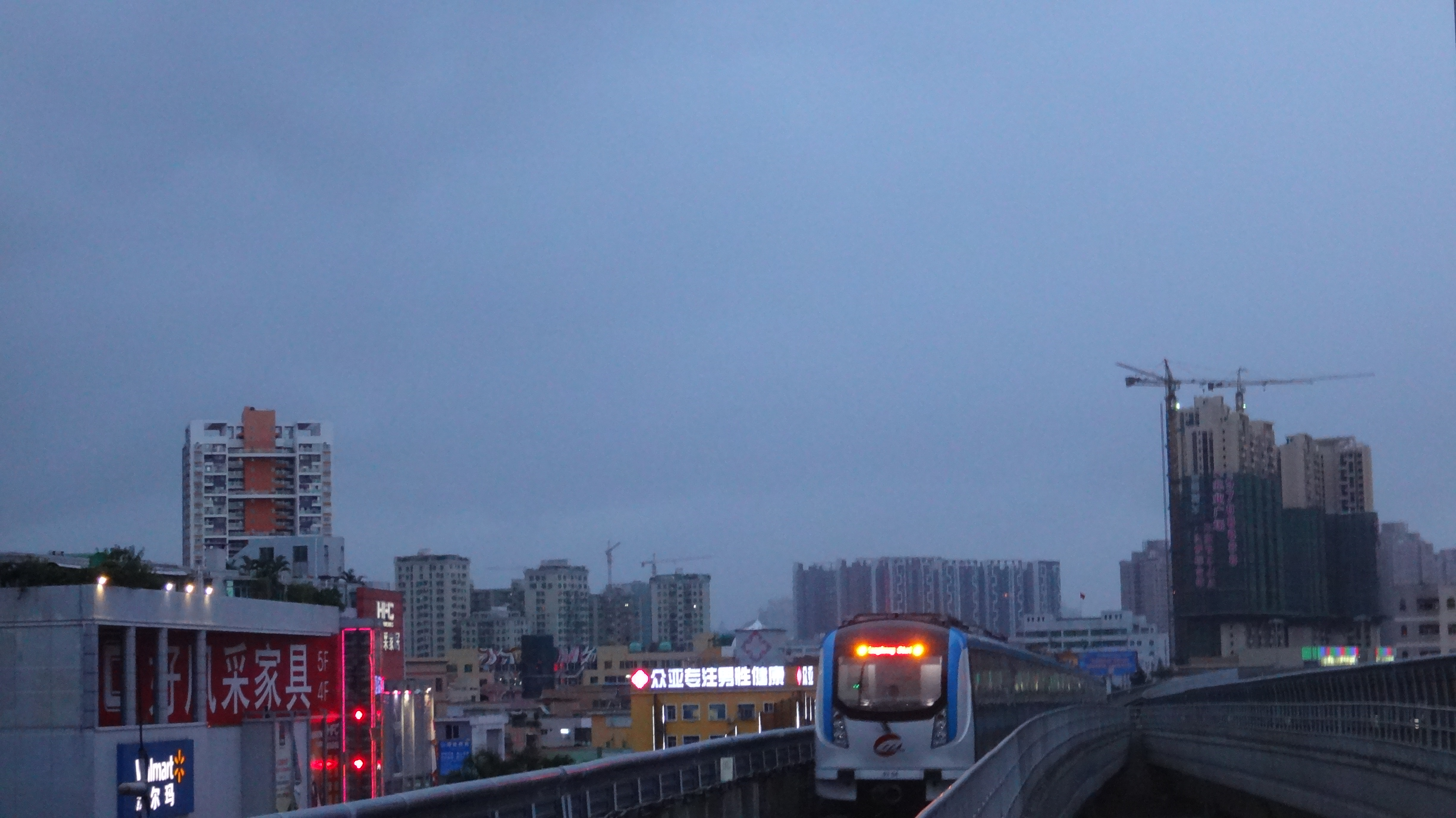 深圳地铁龙岗线一列列车正在驶入龙岗线大芬站